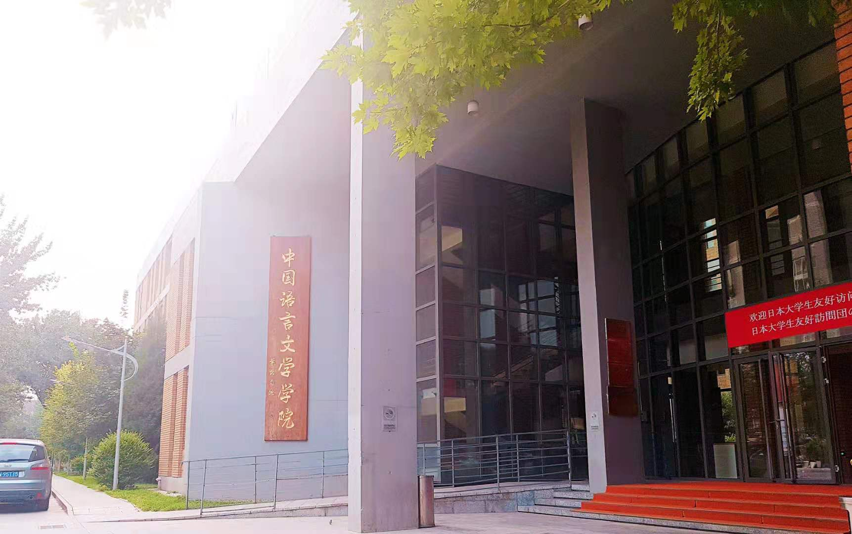 北京外大 中文學部